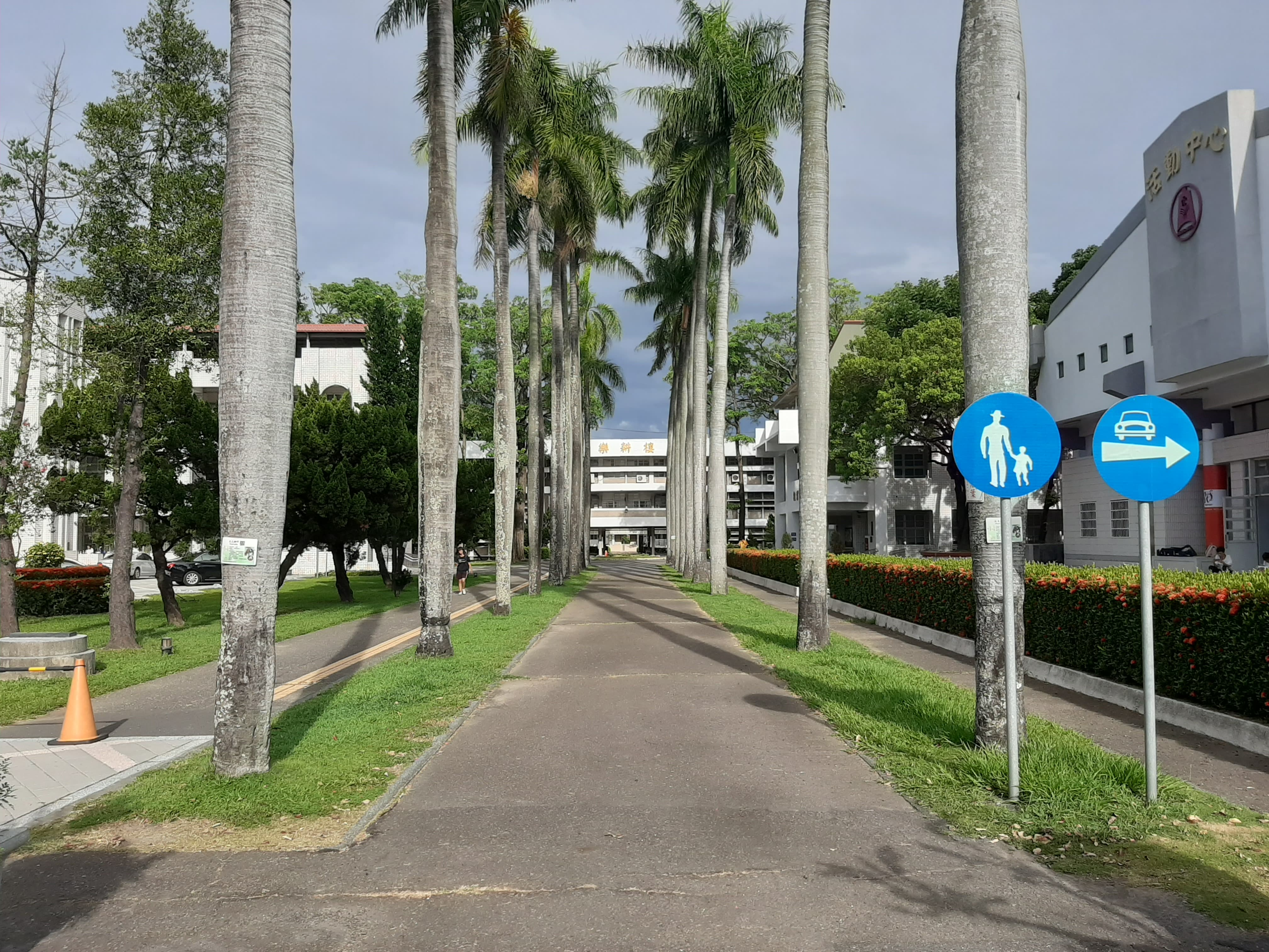 中文（台灣）: 校園中的椰林大道